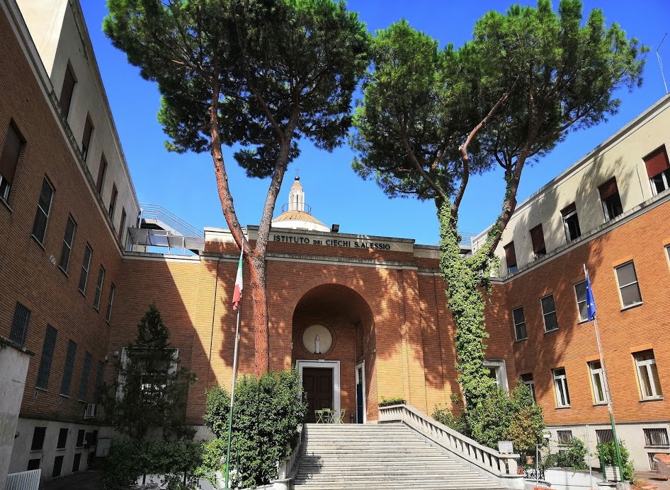 Il monumentale edificio che ospita il Sant'Alessio a Roma in viale Carlo Tommaso Odescalchi a Tor Marancia